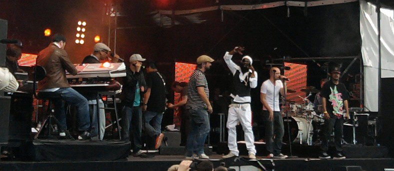 Die Söhne Mannheims bei einem Live-Auftritt in Kiel 2011